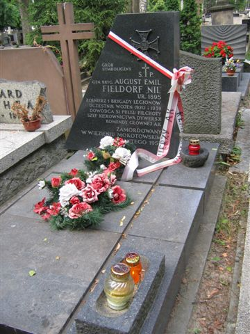 August Emil Fieldorf "Nil"'s symbolic monument (Powązki Cemetery; Cmentarz Komunalny, d. Wojskowy)